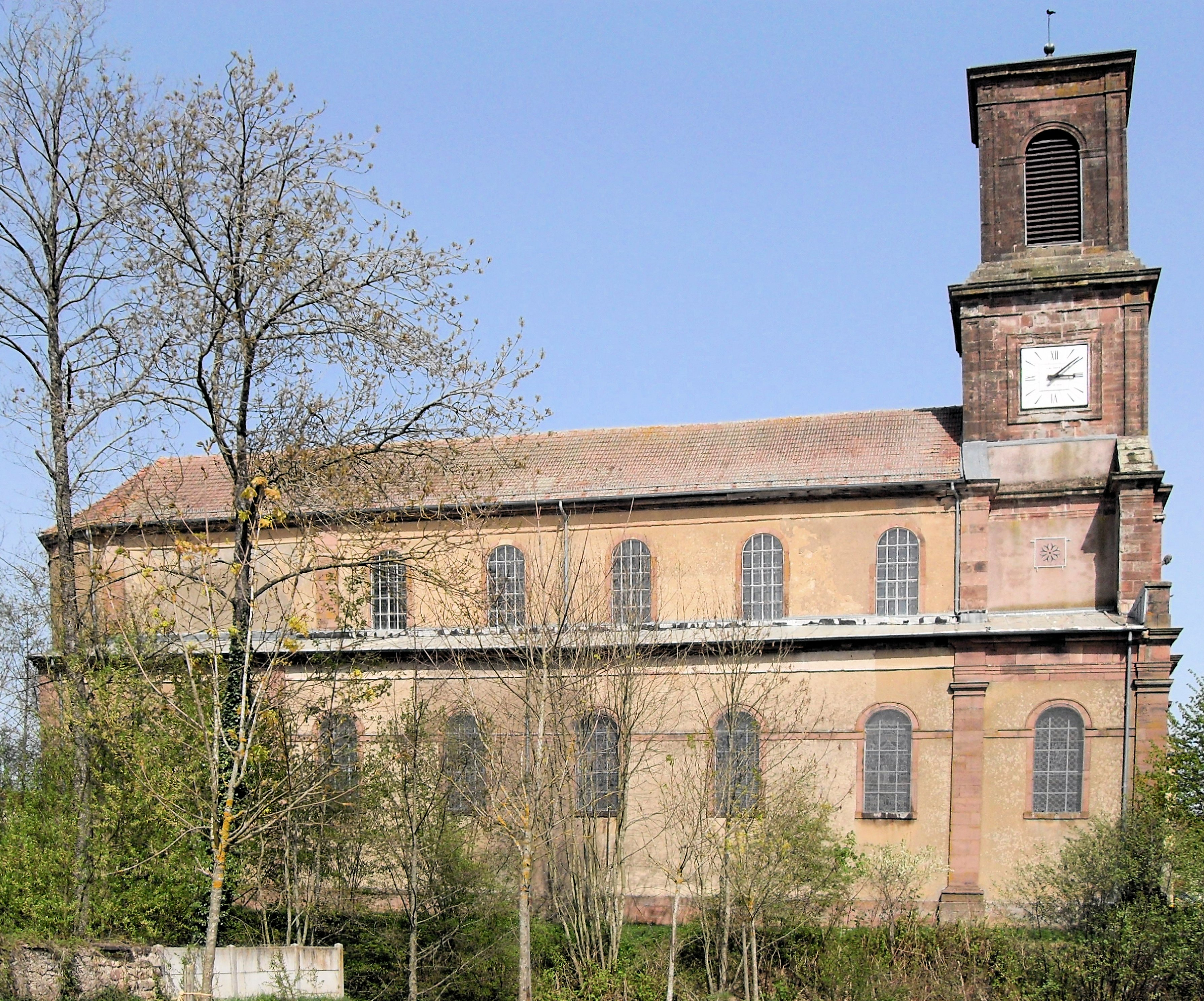 L'église Saint-Vincent à Lachapelle-sous-Rougemont